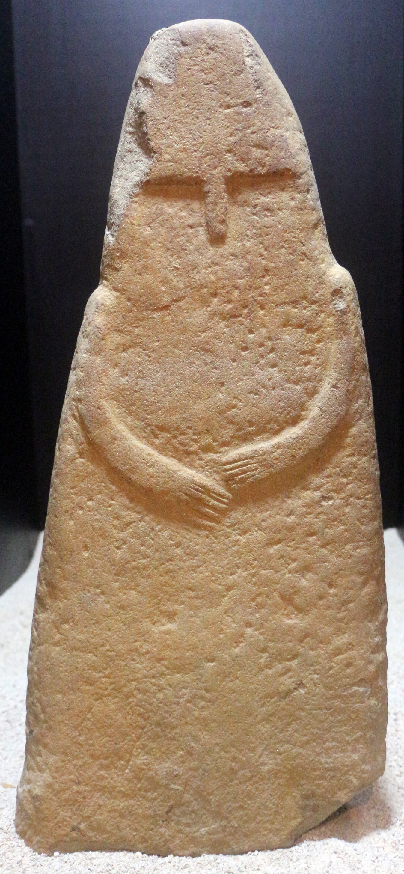 Museo Archeologico (Palazzo del Podestà) This is a photo of a monument which is part of cultural heritage of Italy.